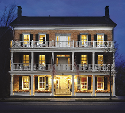 Aurora inn night